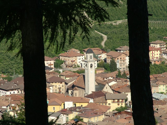 Panorama del paese di Tuenno tra gli alberi, fotografato da ovest